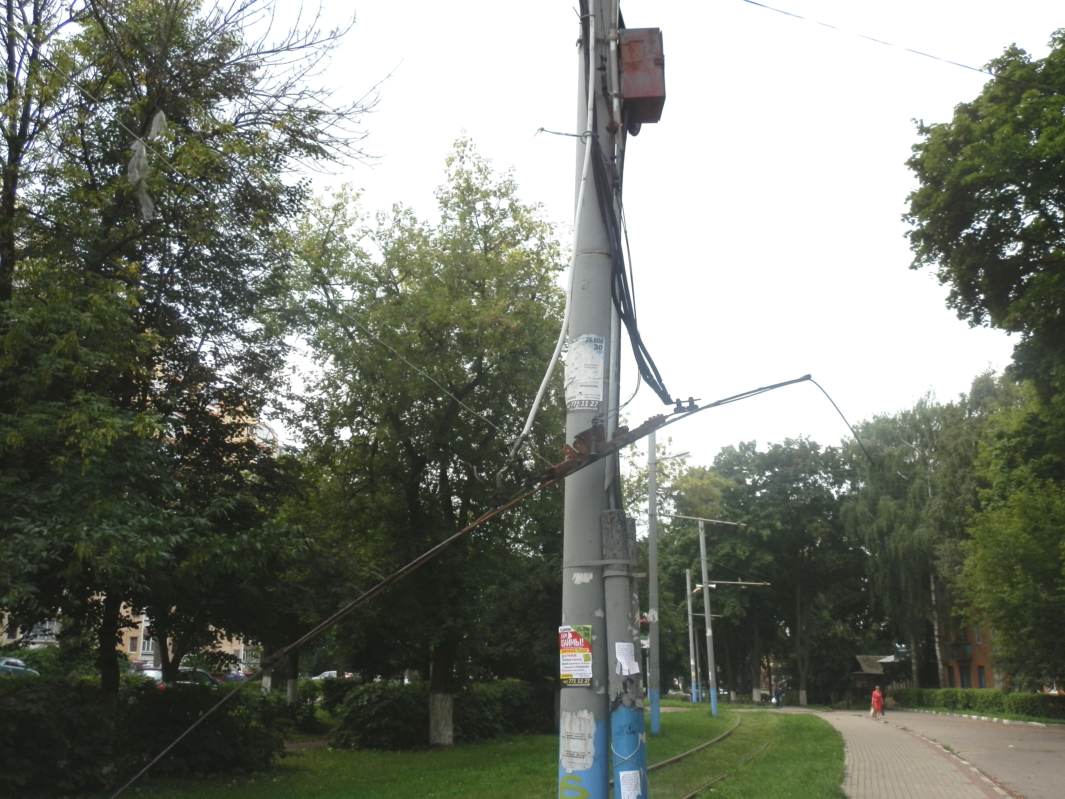 Главный изолятор Ногинского трамвая. Контактная сеть здесь отсутствует.